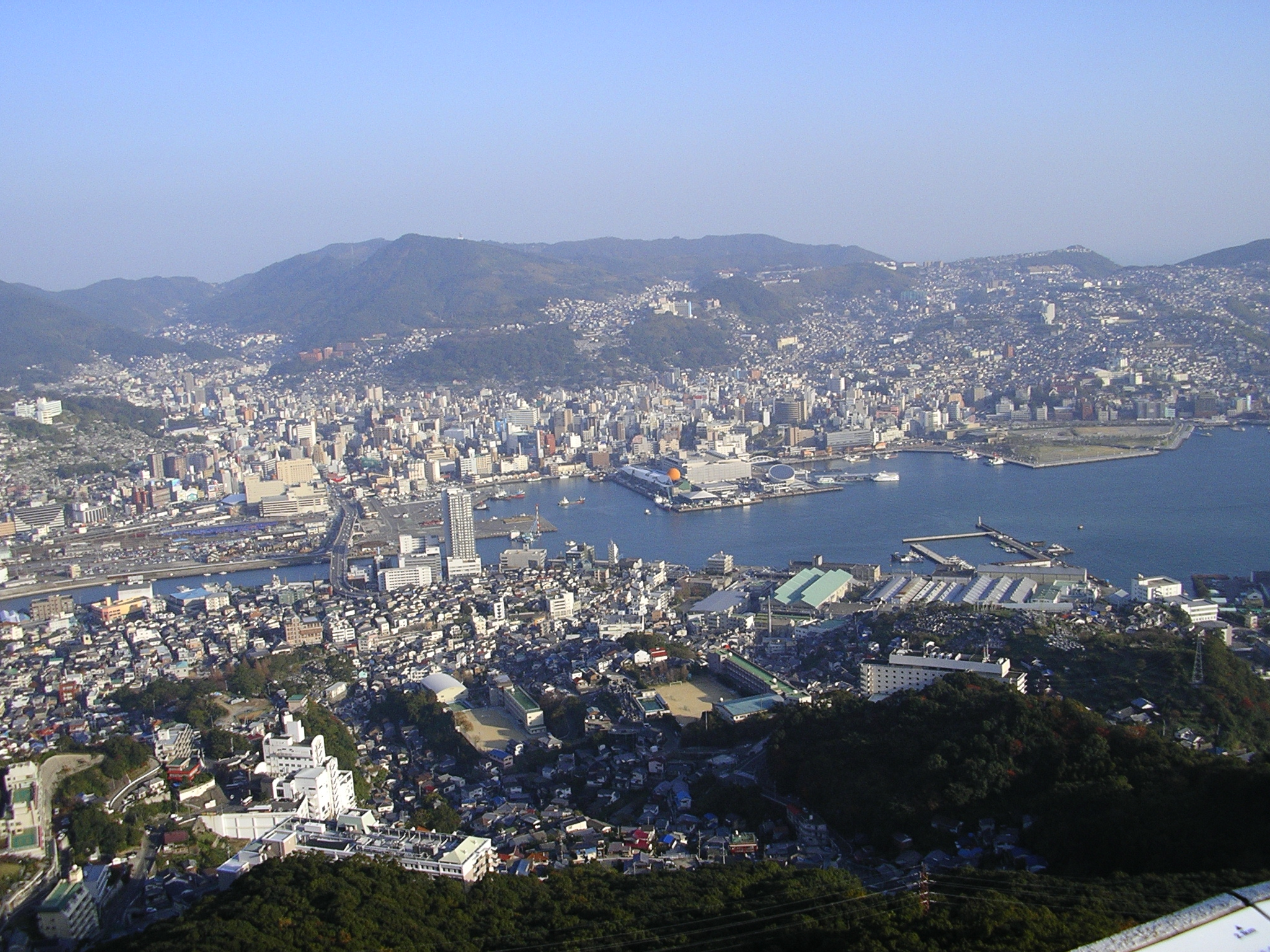 Fotografiert vom Mt. Inasa (32 45 21 N / 129 50 38 E) in Richtung Ost.